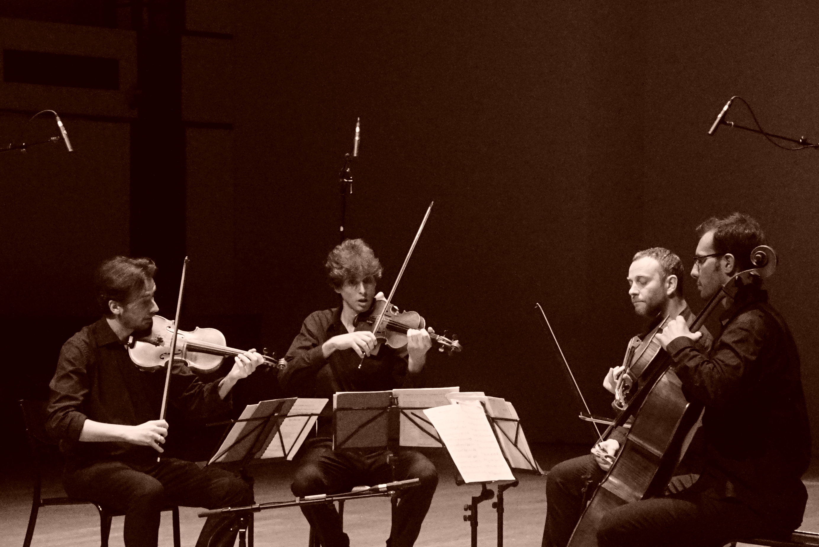 prestation à Reims du Quatuor Béla.